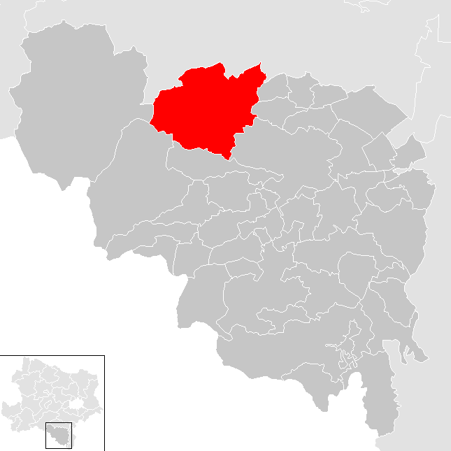 Bezirk Neunkirchen